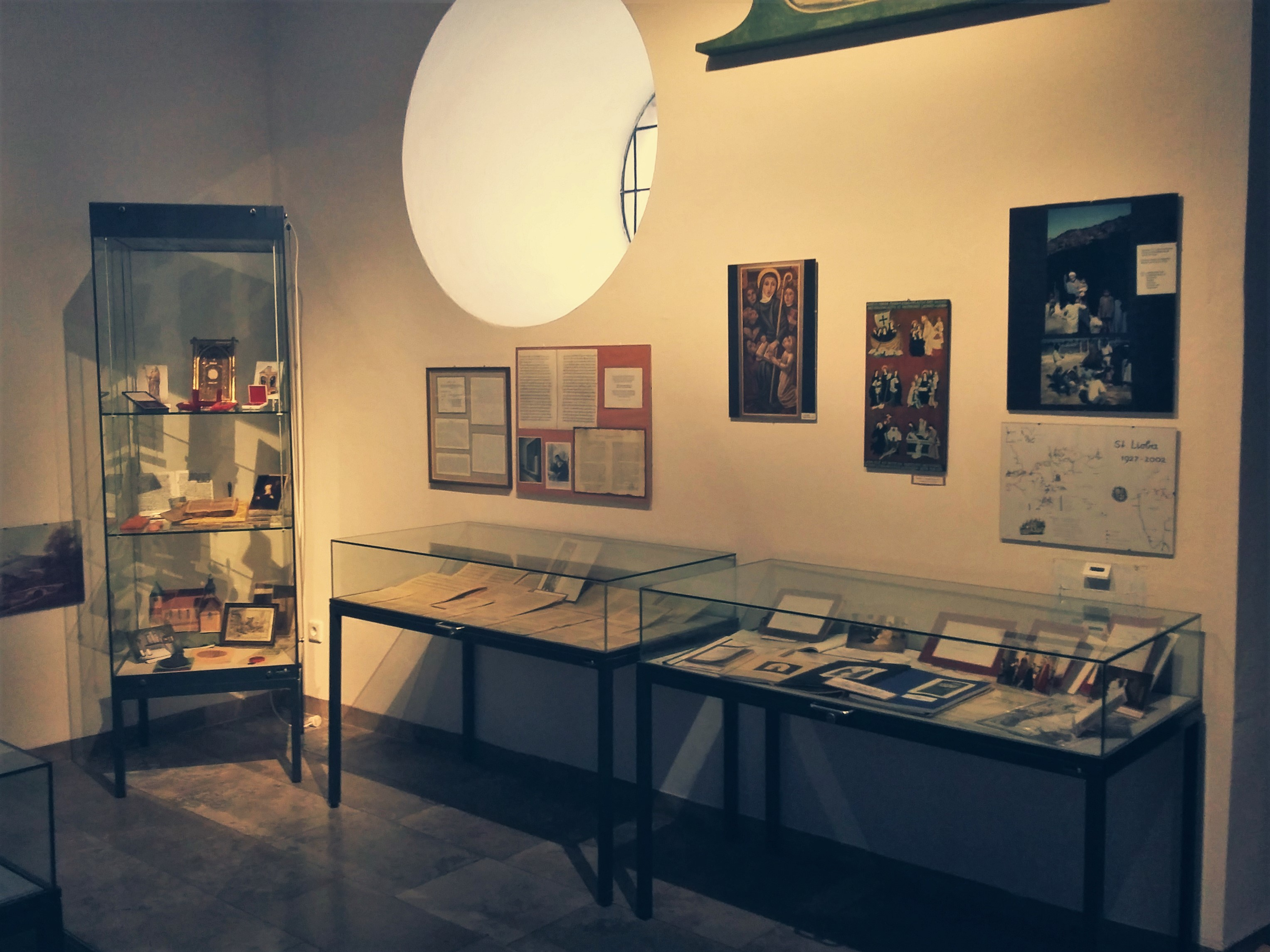 Ausstellung